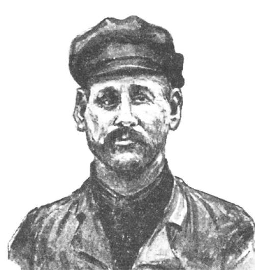 Фонарщик Казимир Шаховский Lamplighter Kzsimir Shakhovsky